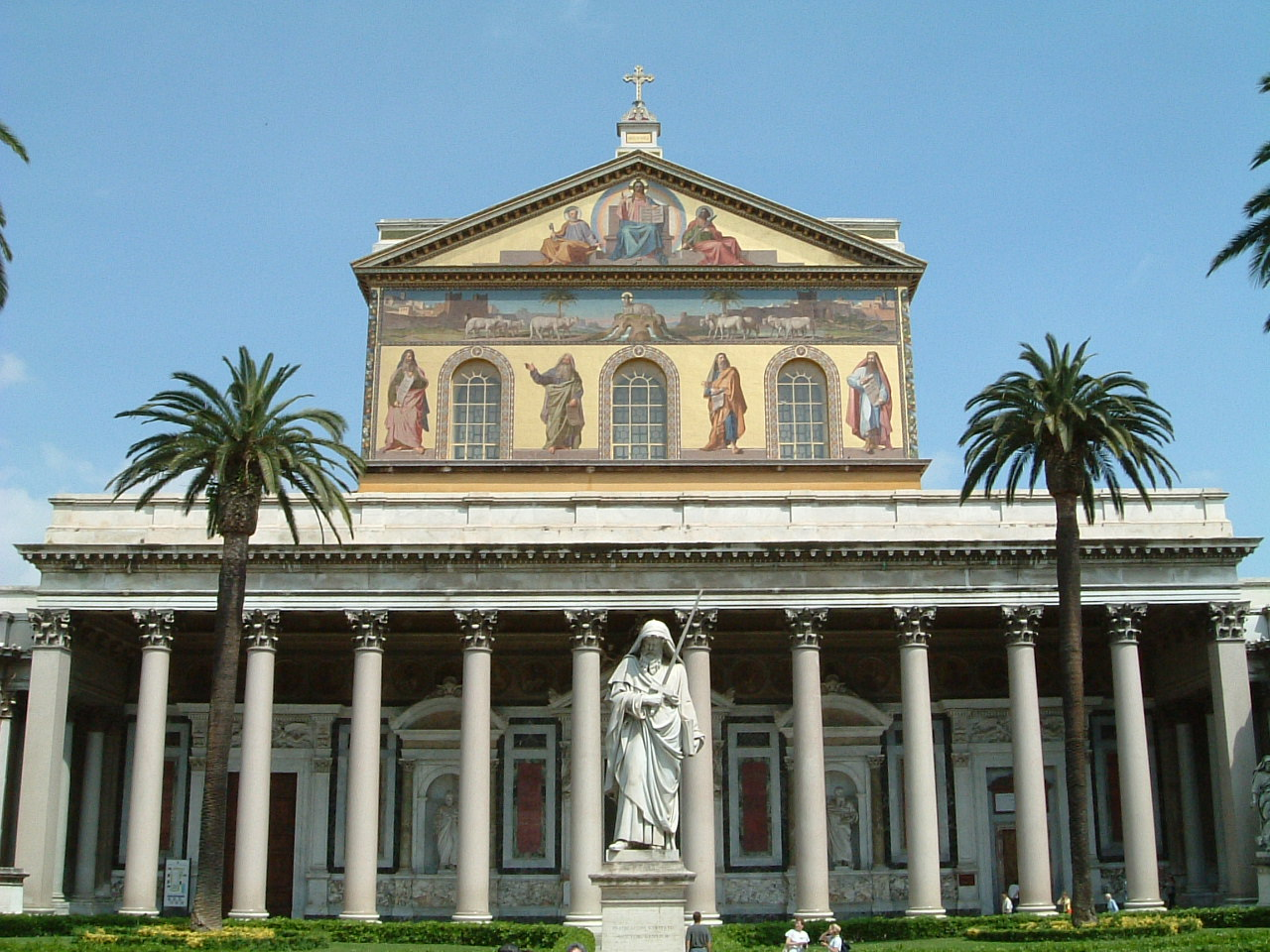 Facciata della Basilica di San Paolo fuori le Mura a Roma.